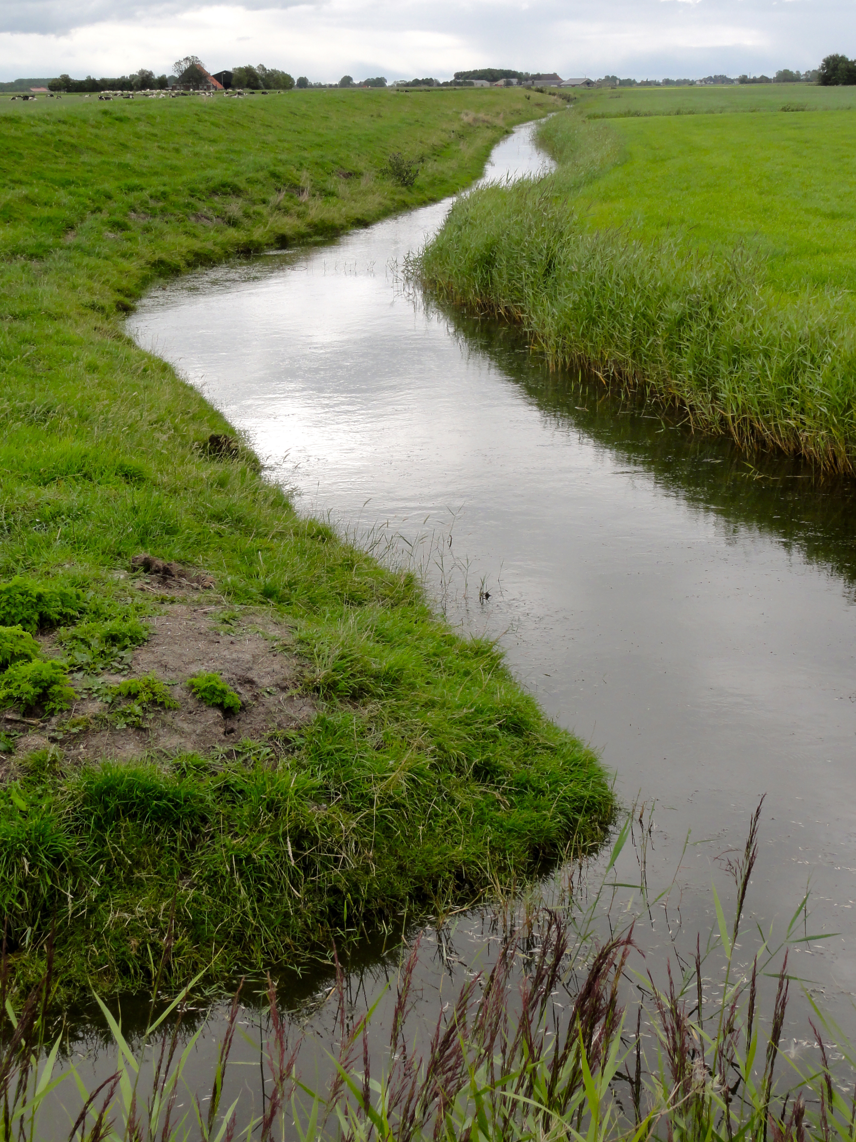 Pingjum Gulden Halsband ten zuidwesten van Pingjum